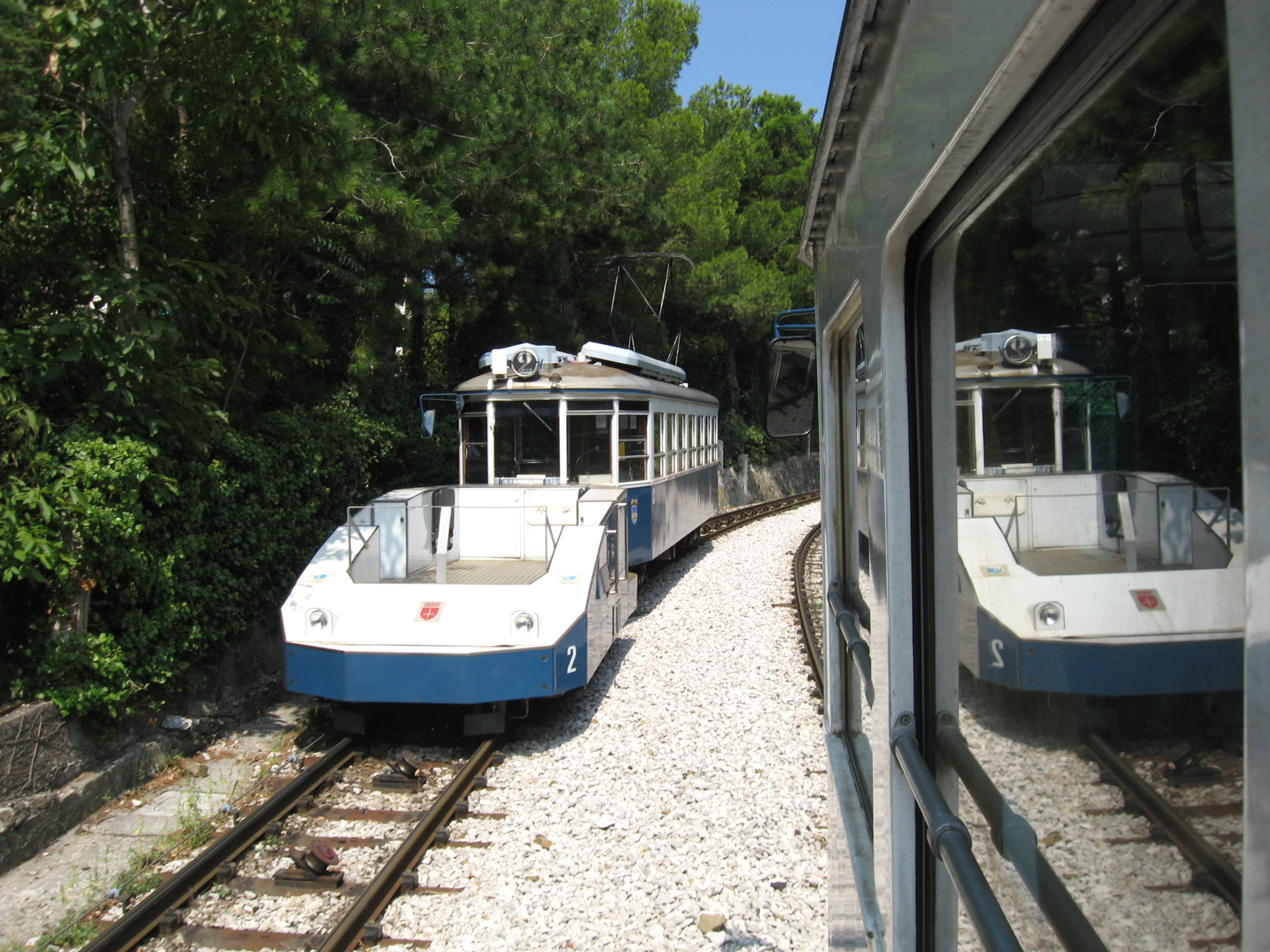 De Opicina Tram in Trieste met kruisende trams.